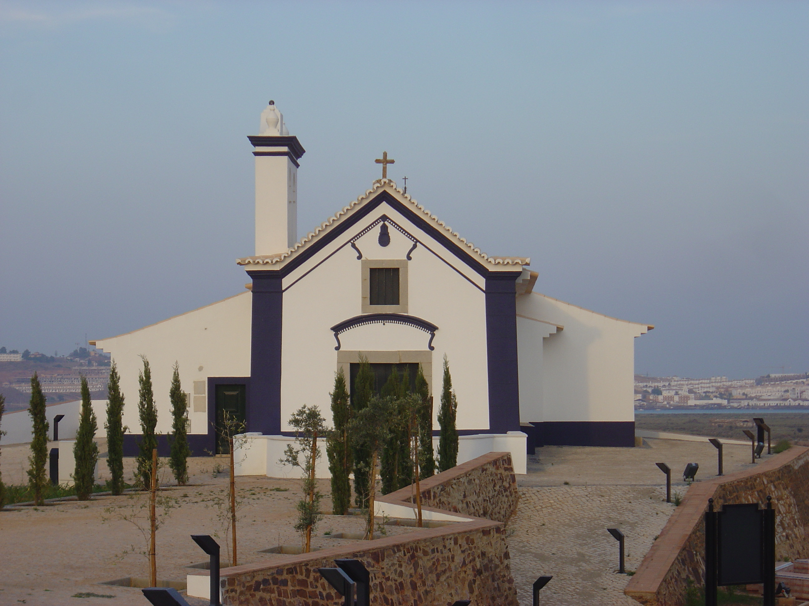 Church, Castro Marim, Portugal